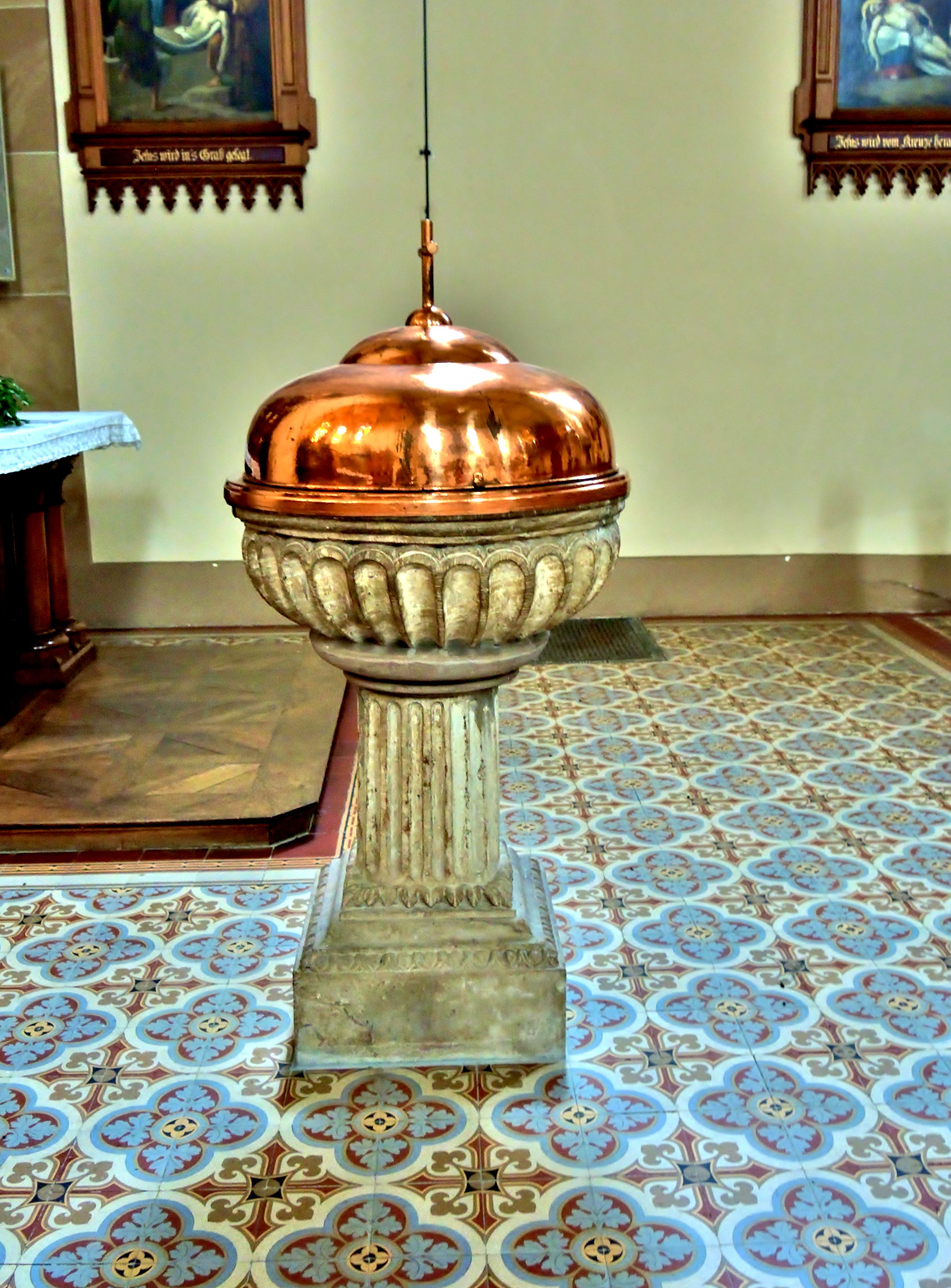 Les fonts baptismaux de l'église d'Husseren-les-Châteaux.Haut-Rhin